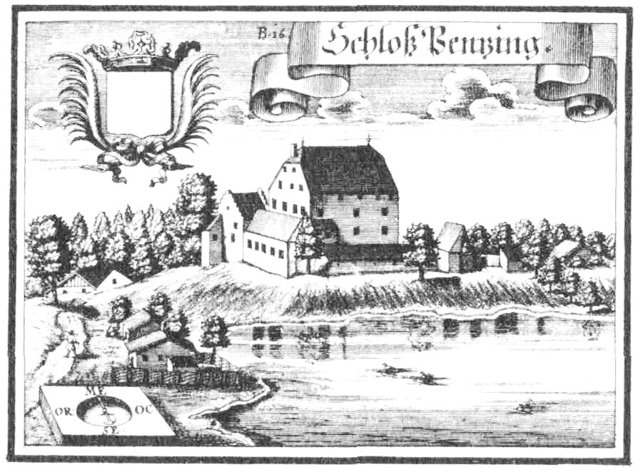 Schloss Penzing nach einem Stich von Michael Wening von 1721